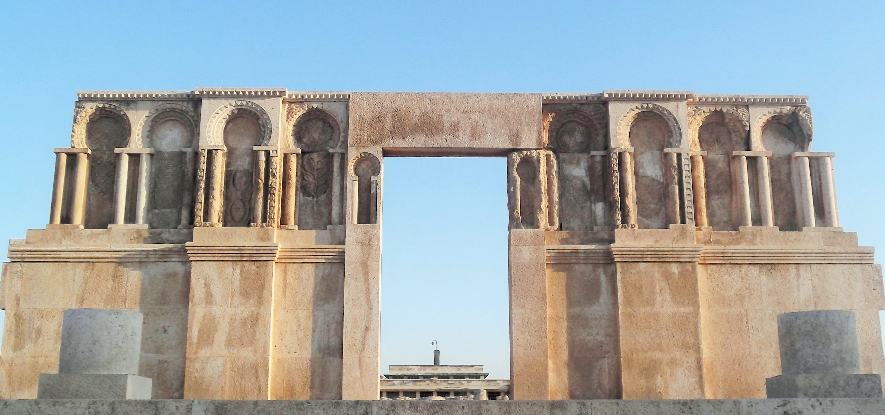 أحد البوابات بجبل القلعة في عمان، الأردن.